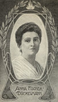 Porträt von Anna Fischer-Dückelmann